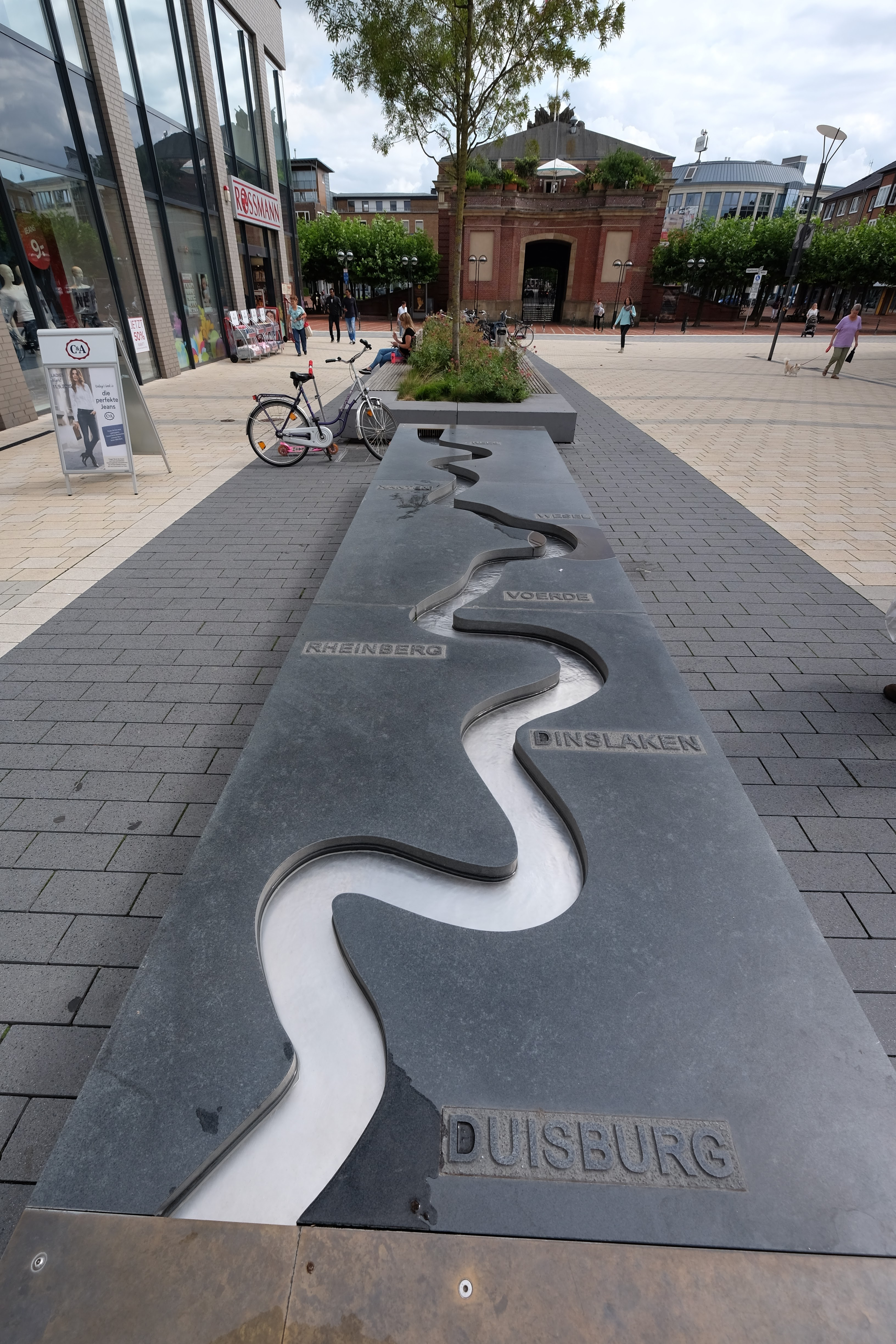 Wesel, Germany